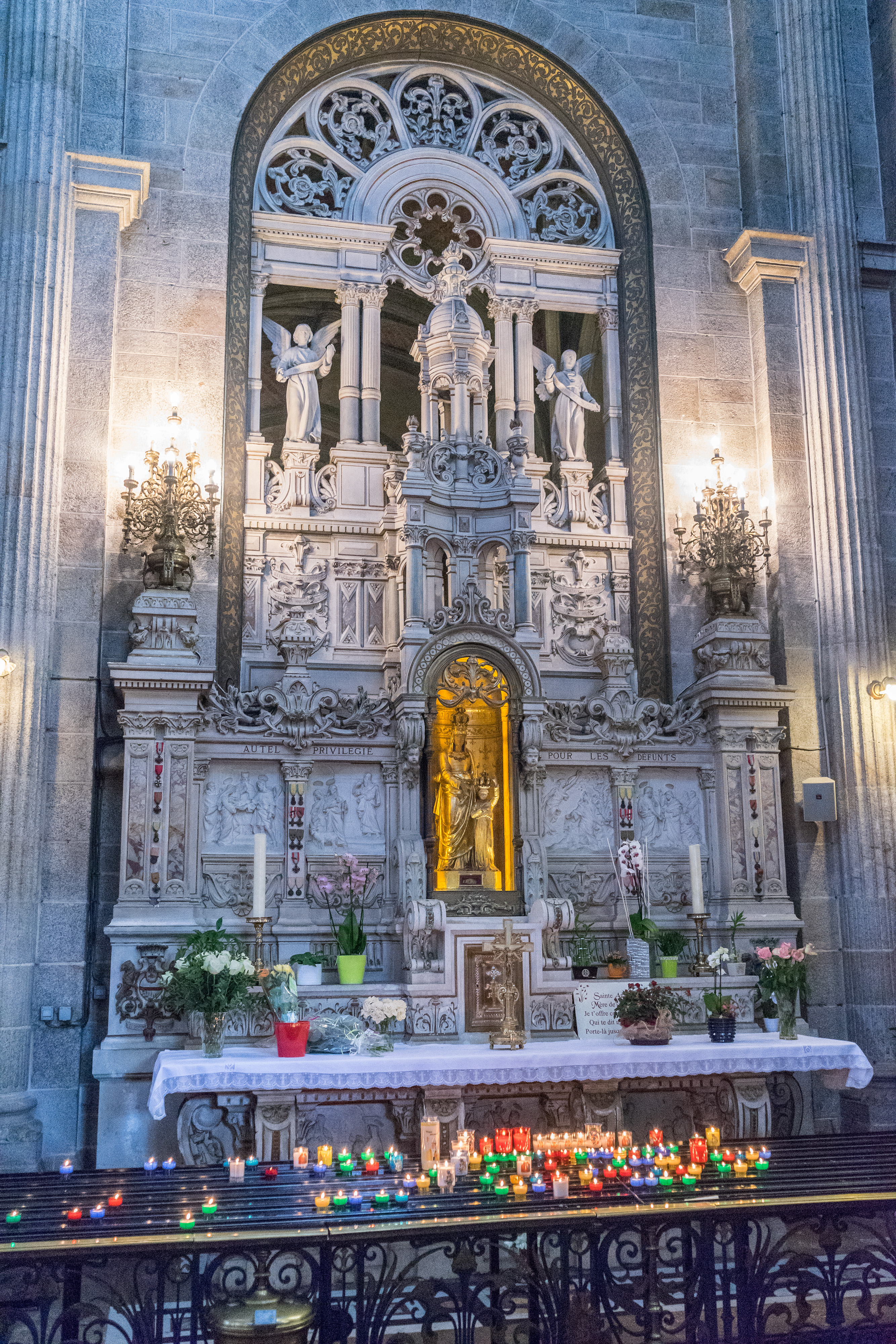 Saint Anne Auray - Autel Staint Anne